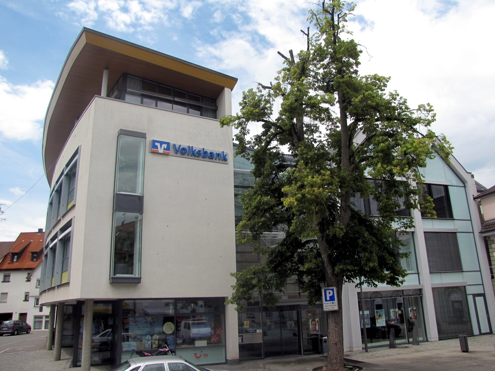 Die Hauptstelle der Volksbank in Meßkirch